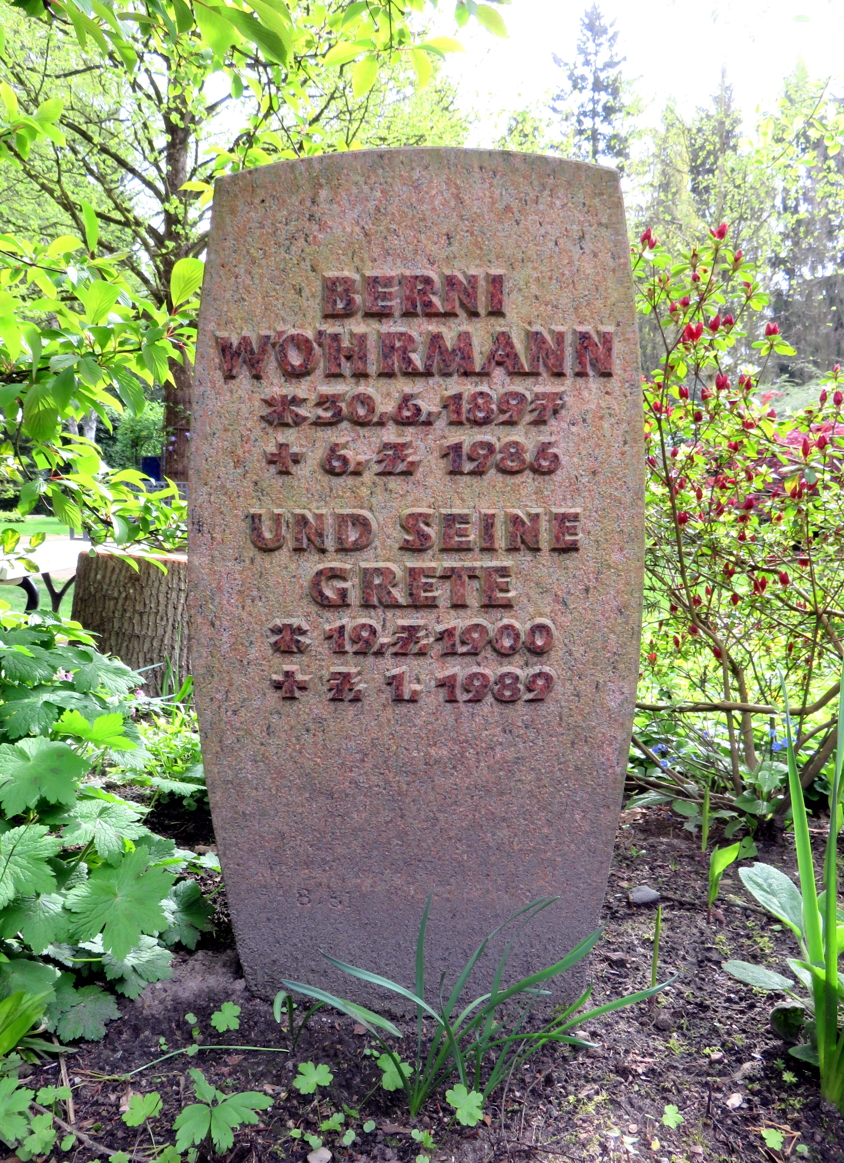 Historischer Grabstein der Hamburger Politikerin (Margarethe) Grete Wöhrmann im Bereich des Gartens der Frauen auf dem Ohlsdorfer Friedhof in Hamburg-Ohlsdorf.